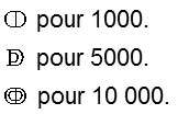 Chiffres romains étendus. Image faite avec un traitement de texte.